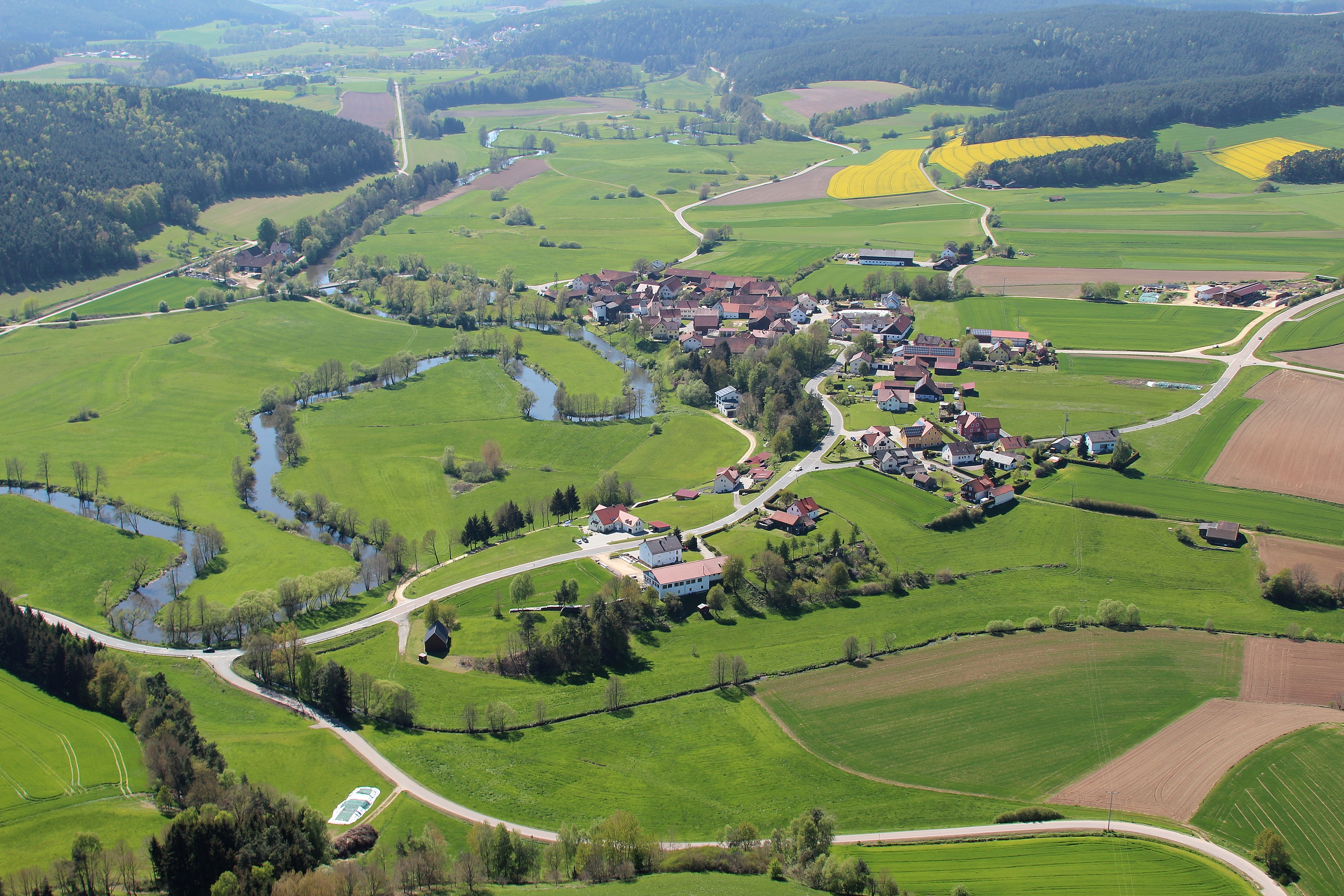 Willhof, Gemeinde Altendorf, Landkreis Schwandorf, Oberpfalz, Bayern